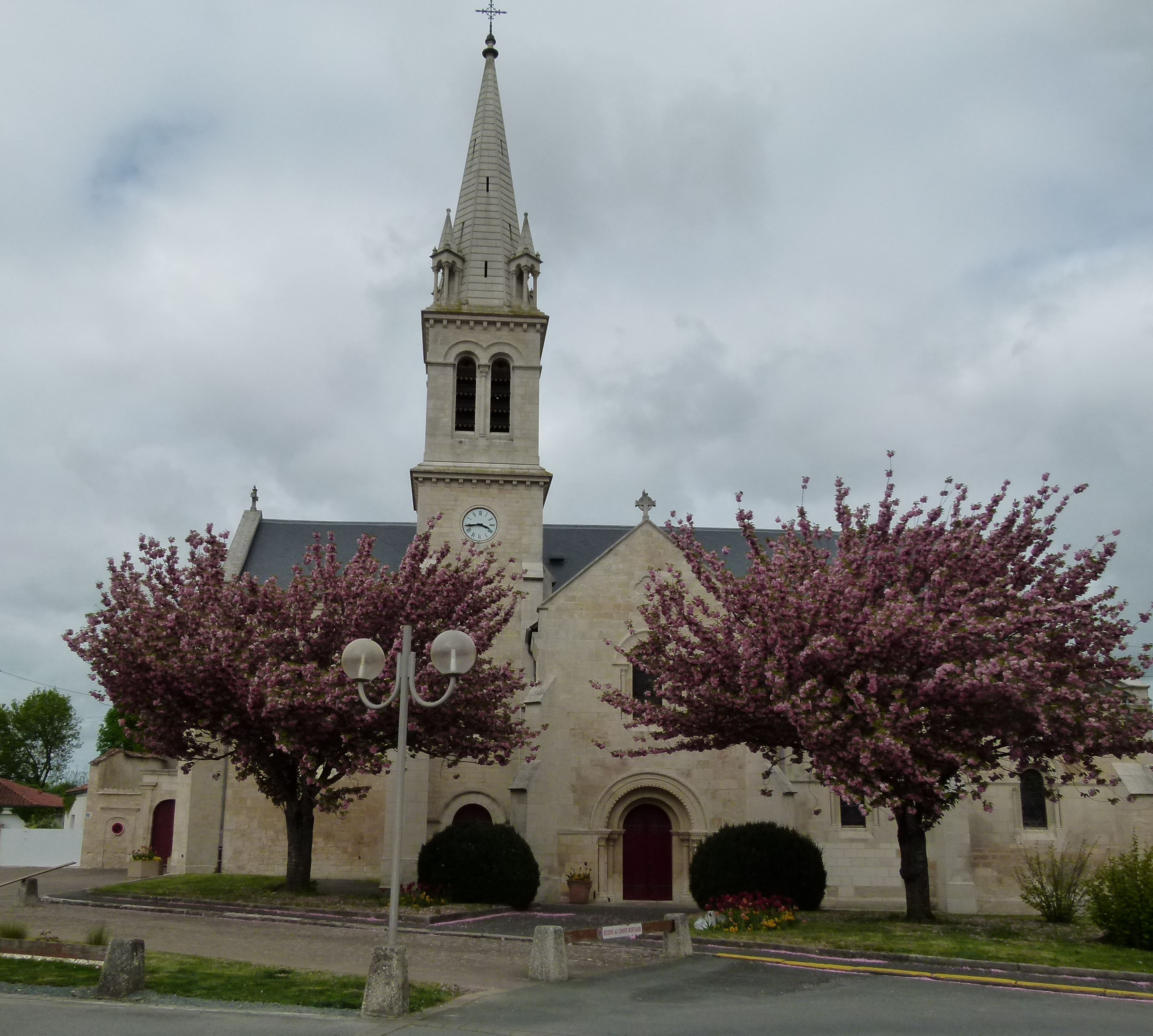 L'église Saint-Étienne d'Aigrefeuille vue depuis la place de la République, côté sud.